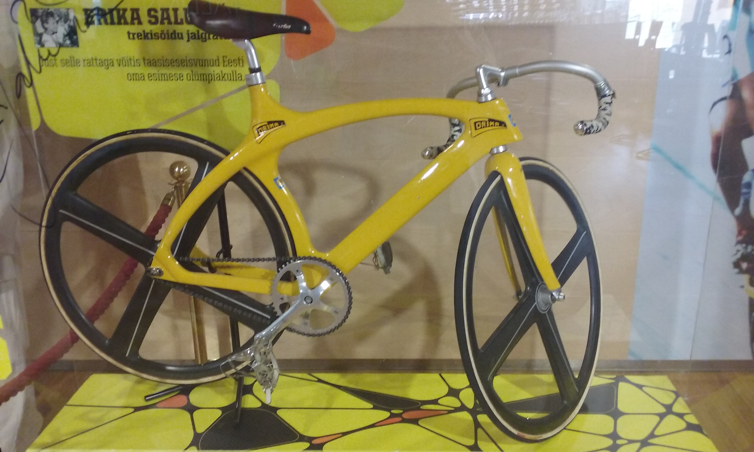 Bicicleta d'Erika Salumäe als Jocs Olímpics de Barcelona 1992 situada a l'aeriport de Tallin